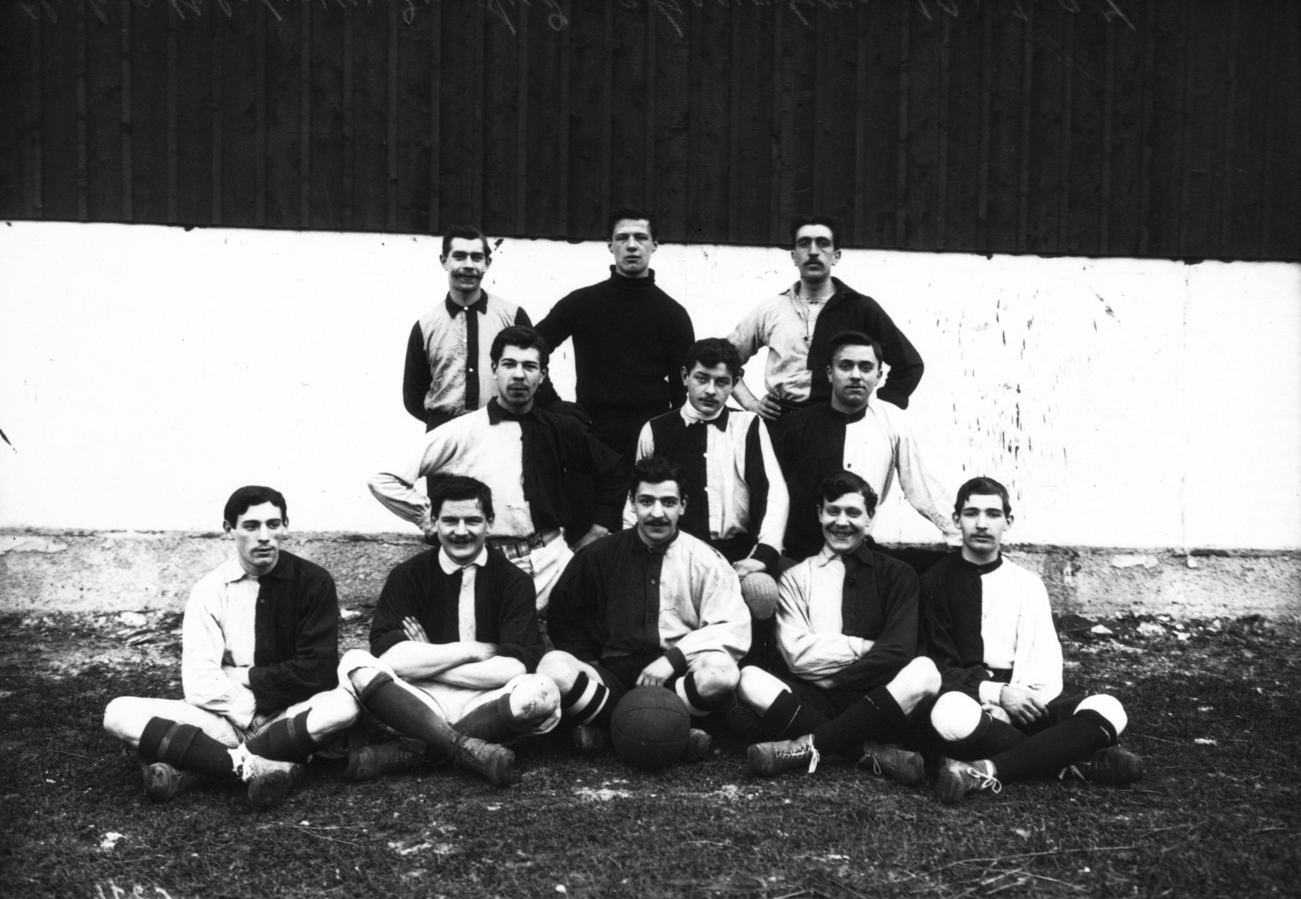 Le Cercle Athlétique du Sud en 1907.